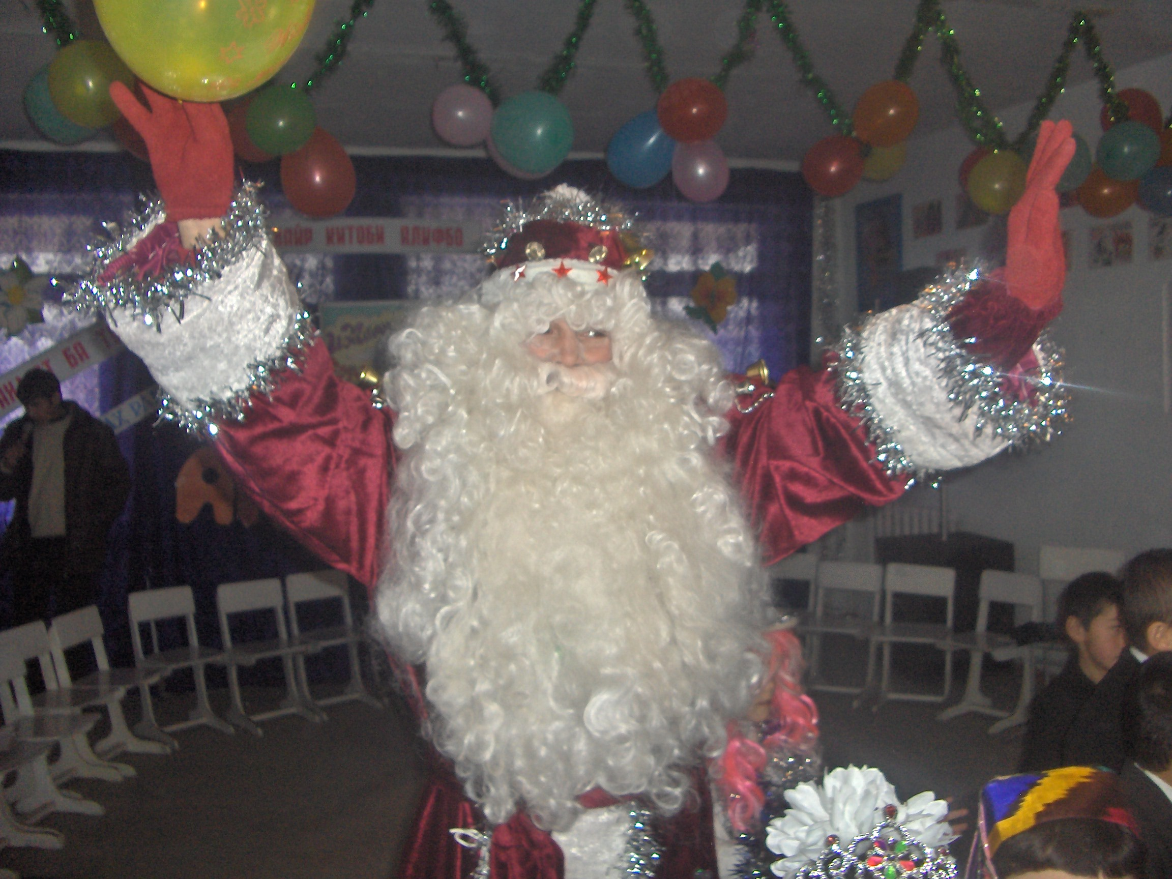 lolollolololololol